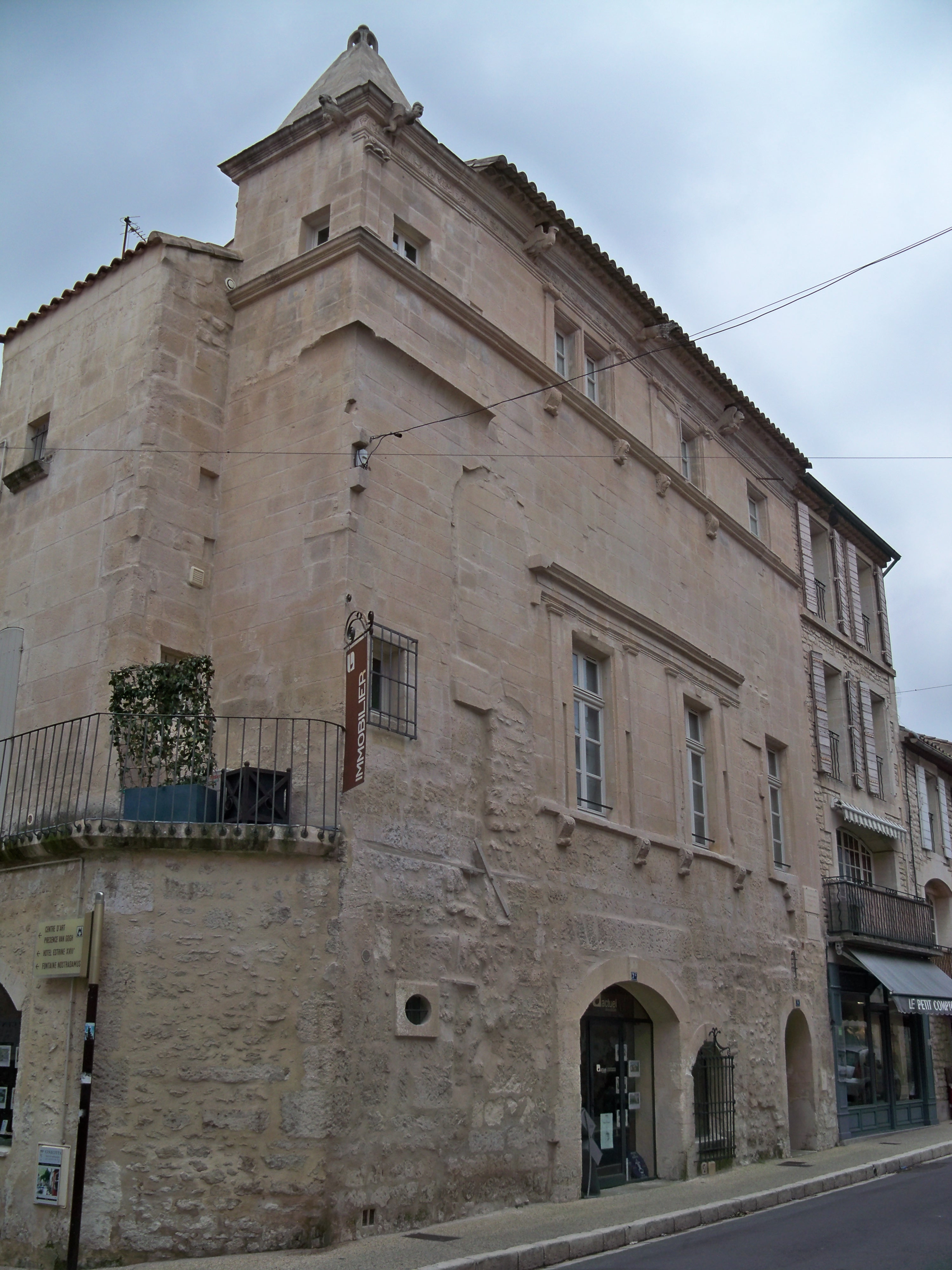 Ancien hotel de ville de Saint Rémy de Provence (13), France, de 1806 à 1820